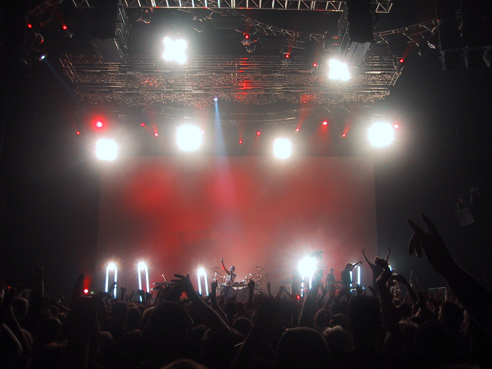 Depeche Mode Live 2001 in Oberhausen während des Songs Personal Jesus